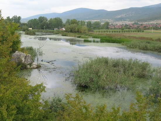 Крупачко језеро код Пирота